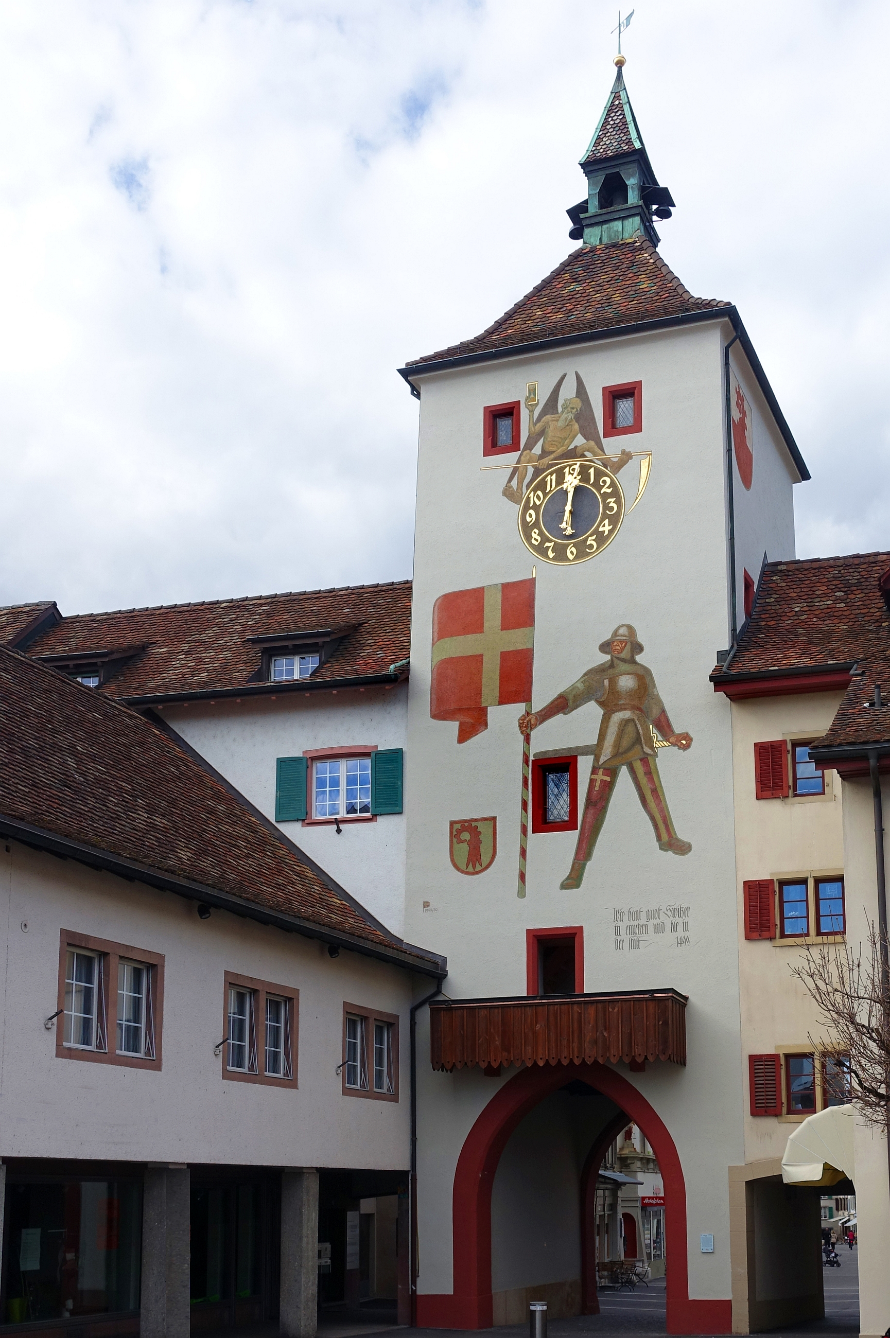 Fassaden Malereien am oberen Stadt Tor (1912/13 und 1949/50) in Liestal von Otto Plattner (1886-1951)